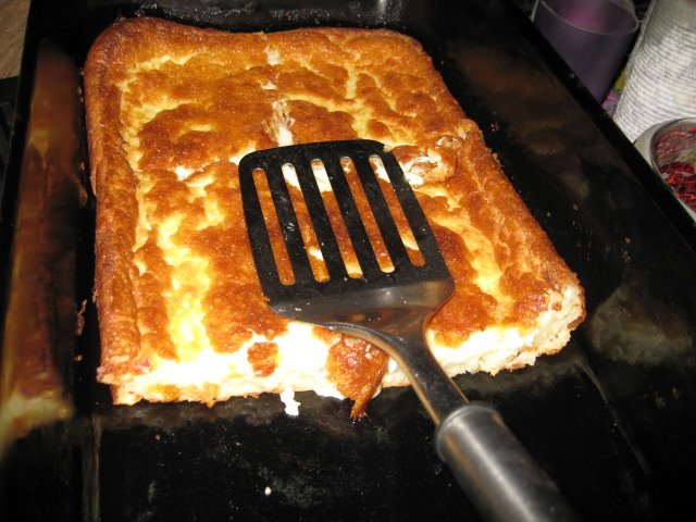 En vanlig enkel tjockpannkaka i en långpanna